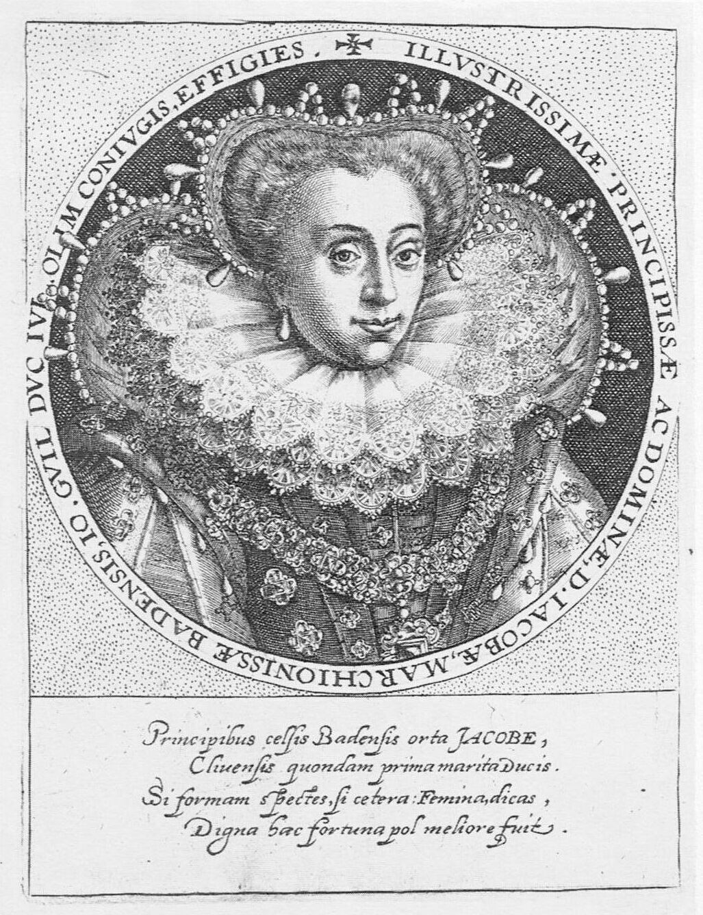 Jakobe von Baden, Kupferstich von Crispin de Passe (?) um 1600